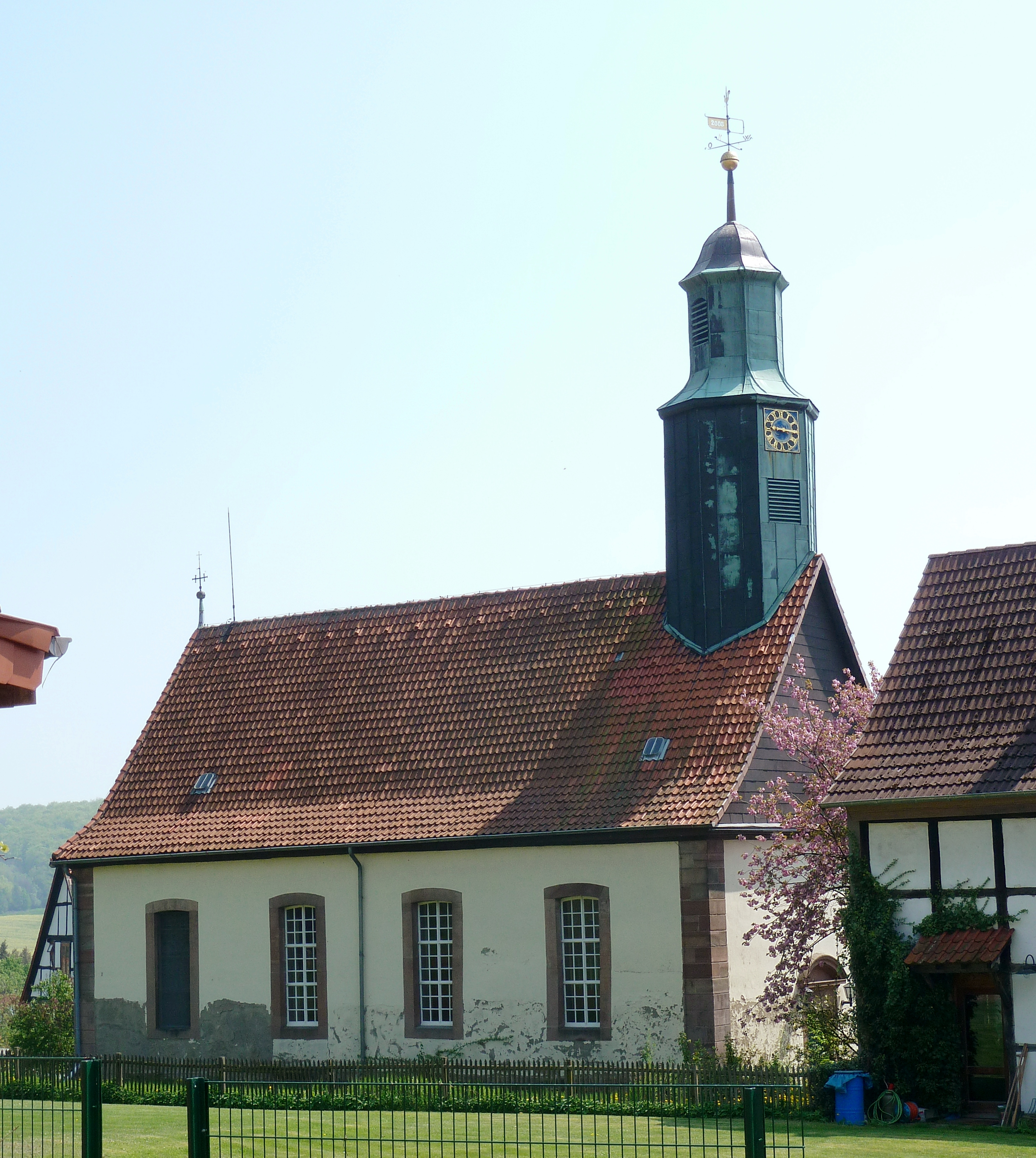 Ev.-luth. Kirche in Groß Lengden, Gemeinde Gleichen, Südniedersachsen. Wahrscheinlich Mitte des 18. Jahrhunderts errichtet. Im 1907 ausgemalten Innenraum befindet sich eine Kanzelaltarwand aus dem frühen 19. Jahrhundert.